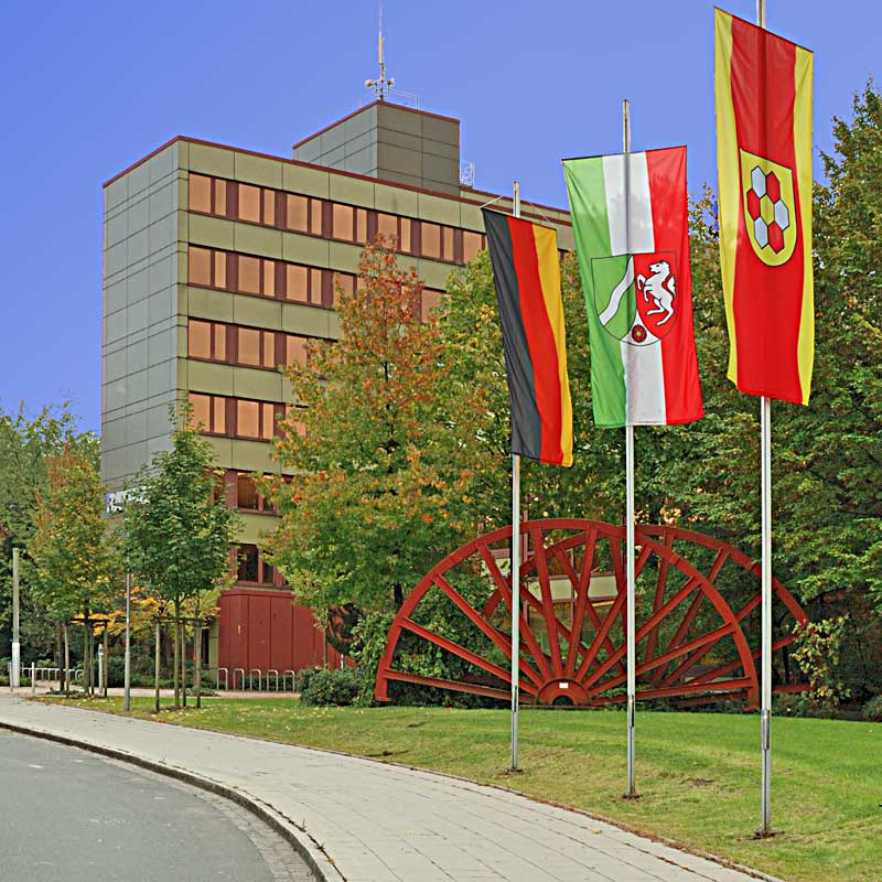 Germany Bergkamen Rathaus